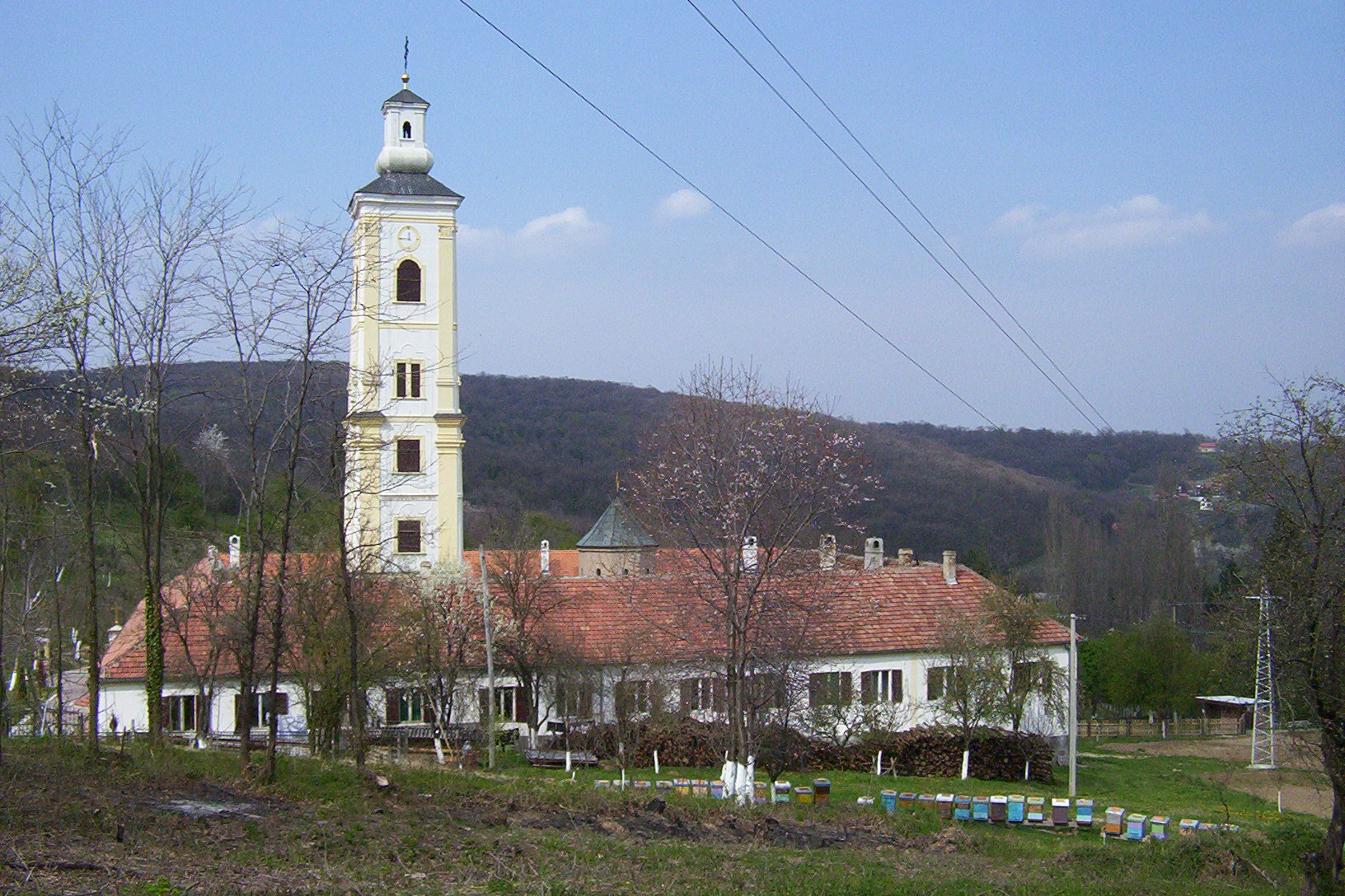 Velika Remeta monastery in Vojvodina, Serbia.